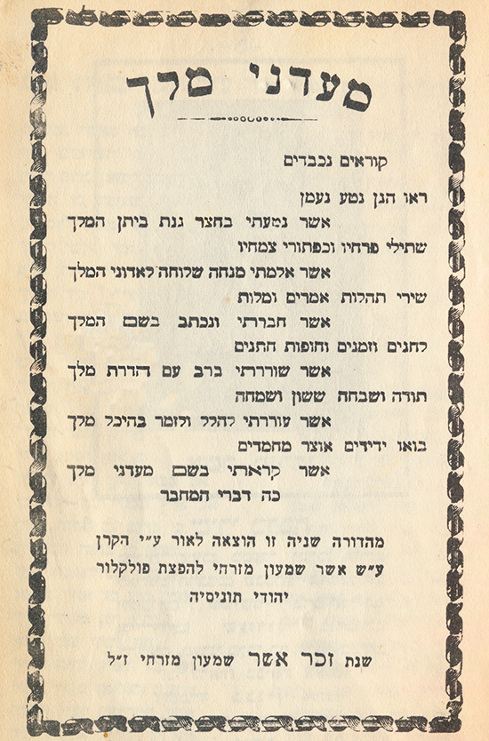 שער הספר מעדני מלך מאת אשר מזרחי, מהדורה שנייה שיצאה לאחר פטירתו